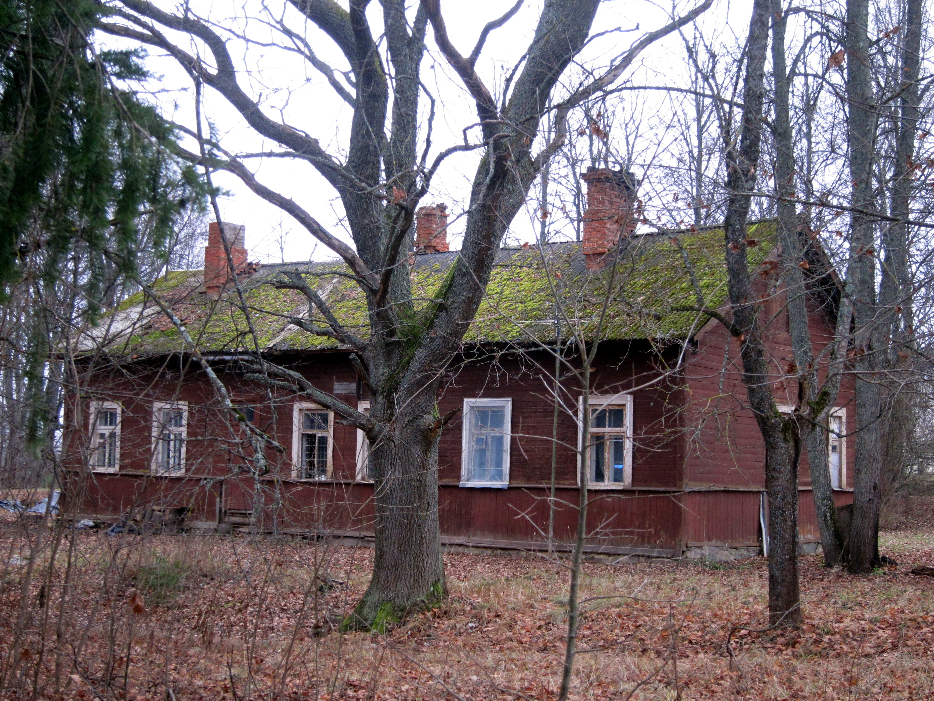 Bijusī Lizuma stacija